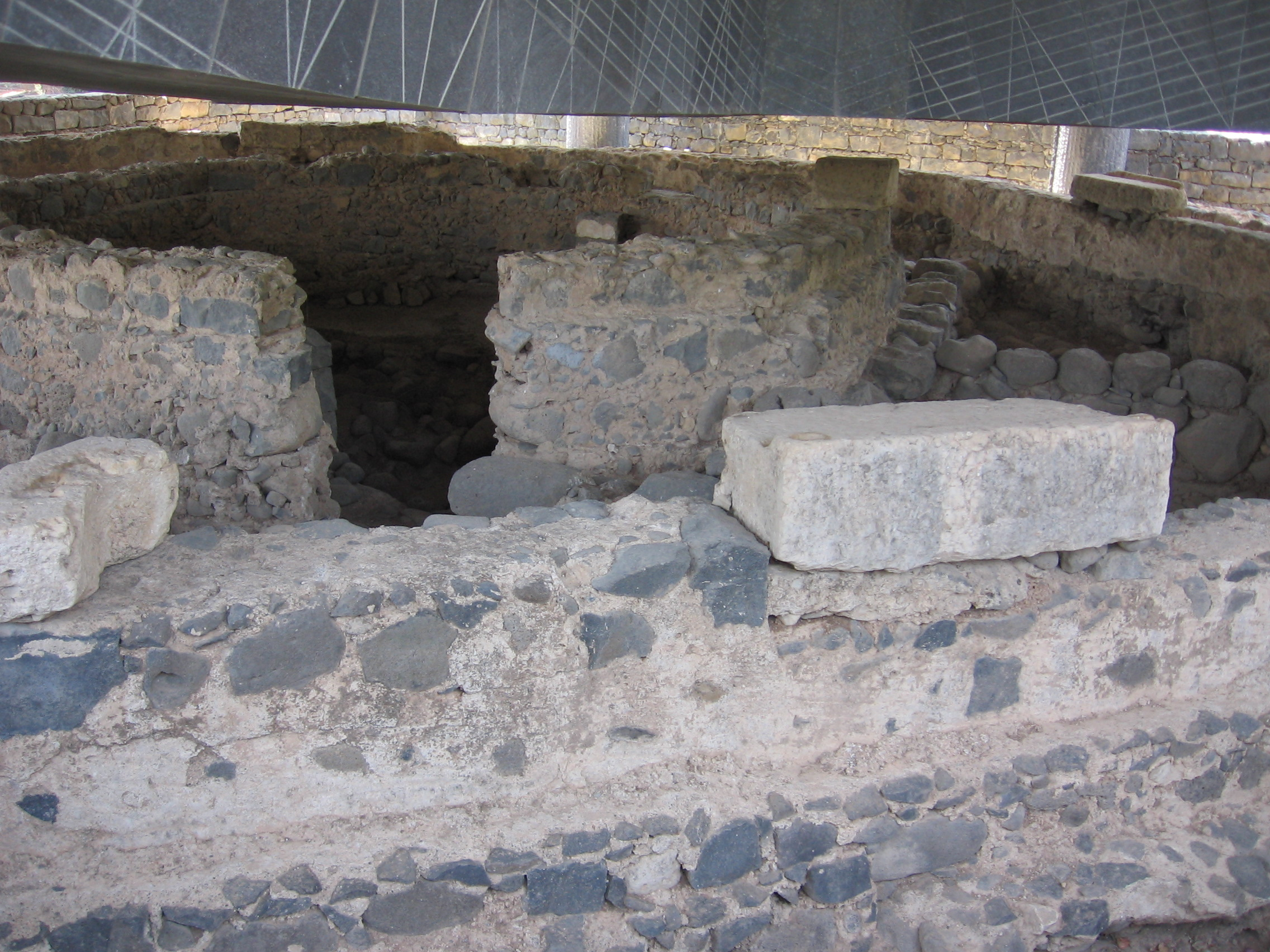 Cafarnao: la casa di san Pietro.